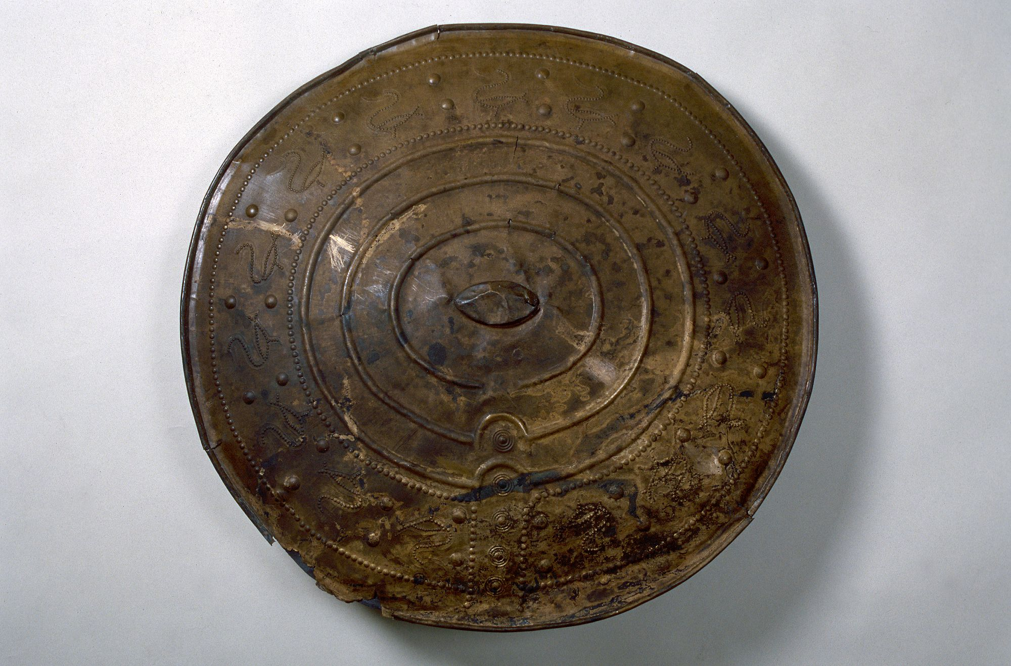 Nackhälleskölden. Bild från Statens Historiska Museum. Inventarienummer 3420.